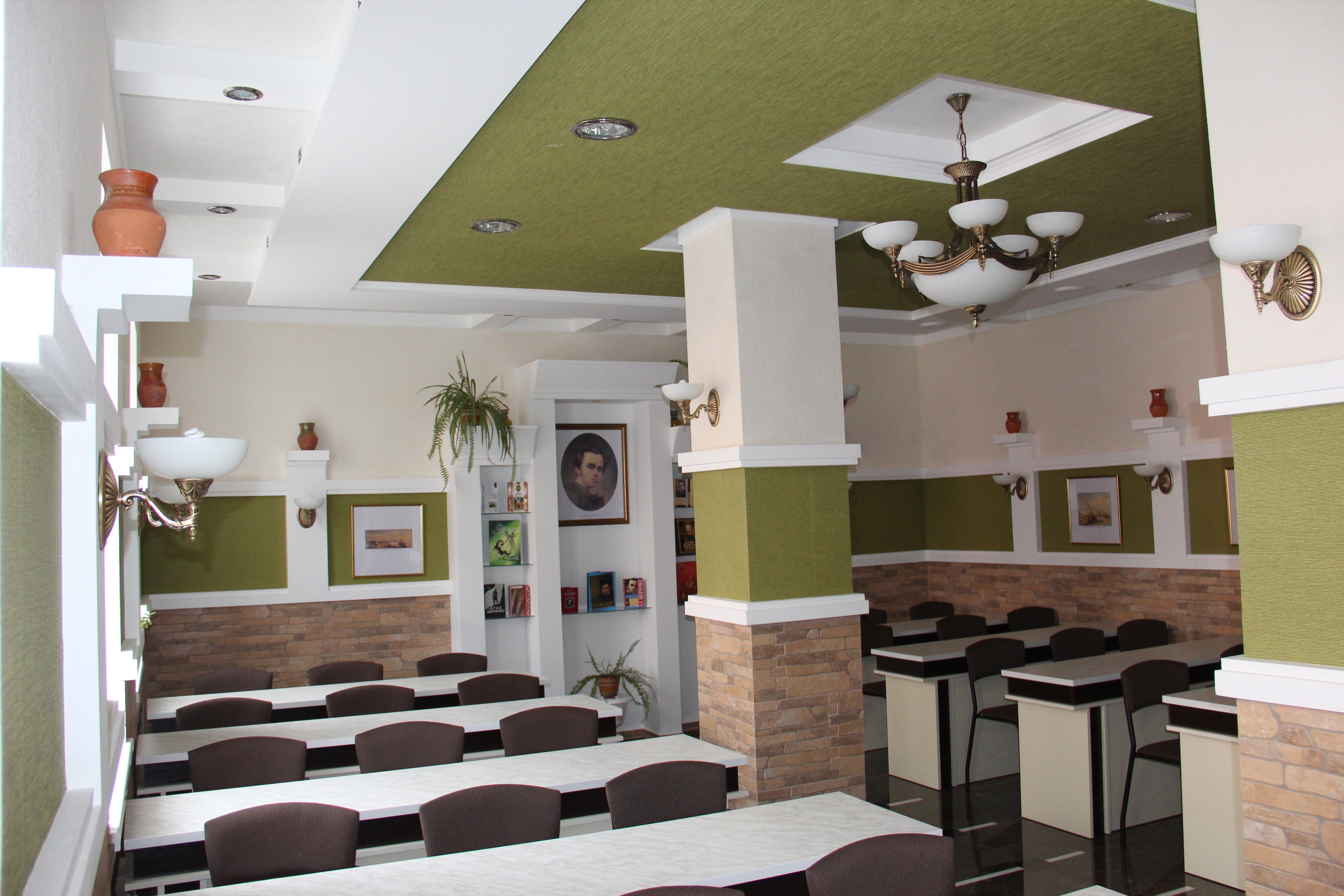 "Шевченківська зала" бібліотечного комплексу ХКТЕІ - травень 2013 року